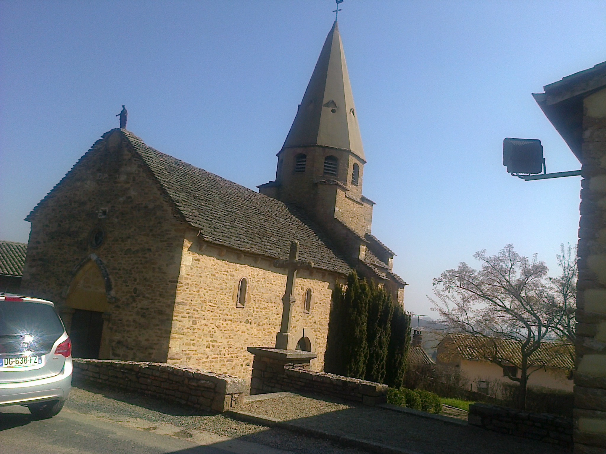 Eglise de Saint-Vérand